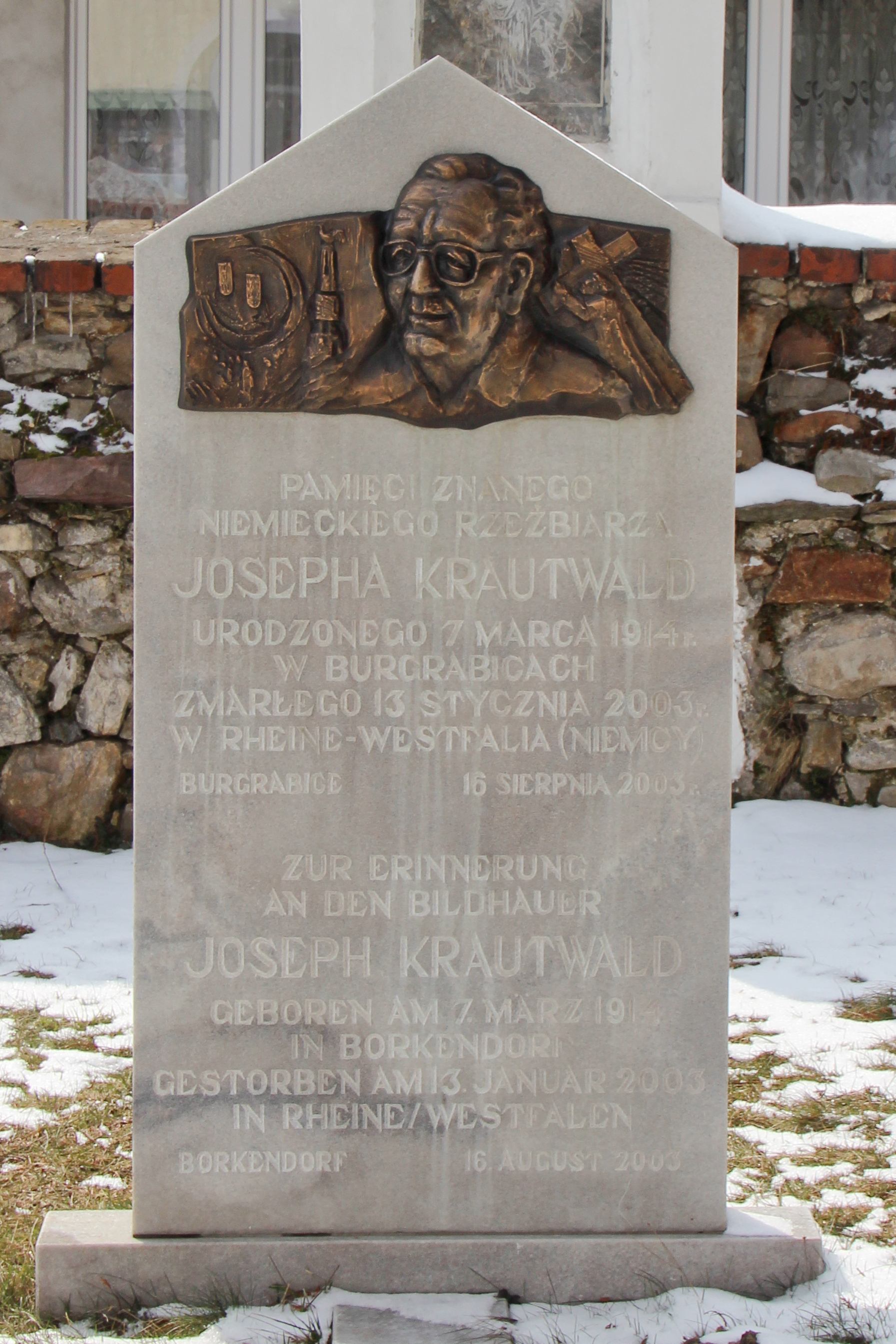 Pomnik Josepha Krautwald w Burgrabicach, jego miejsce urodzenia.